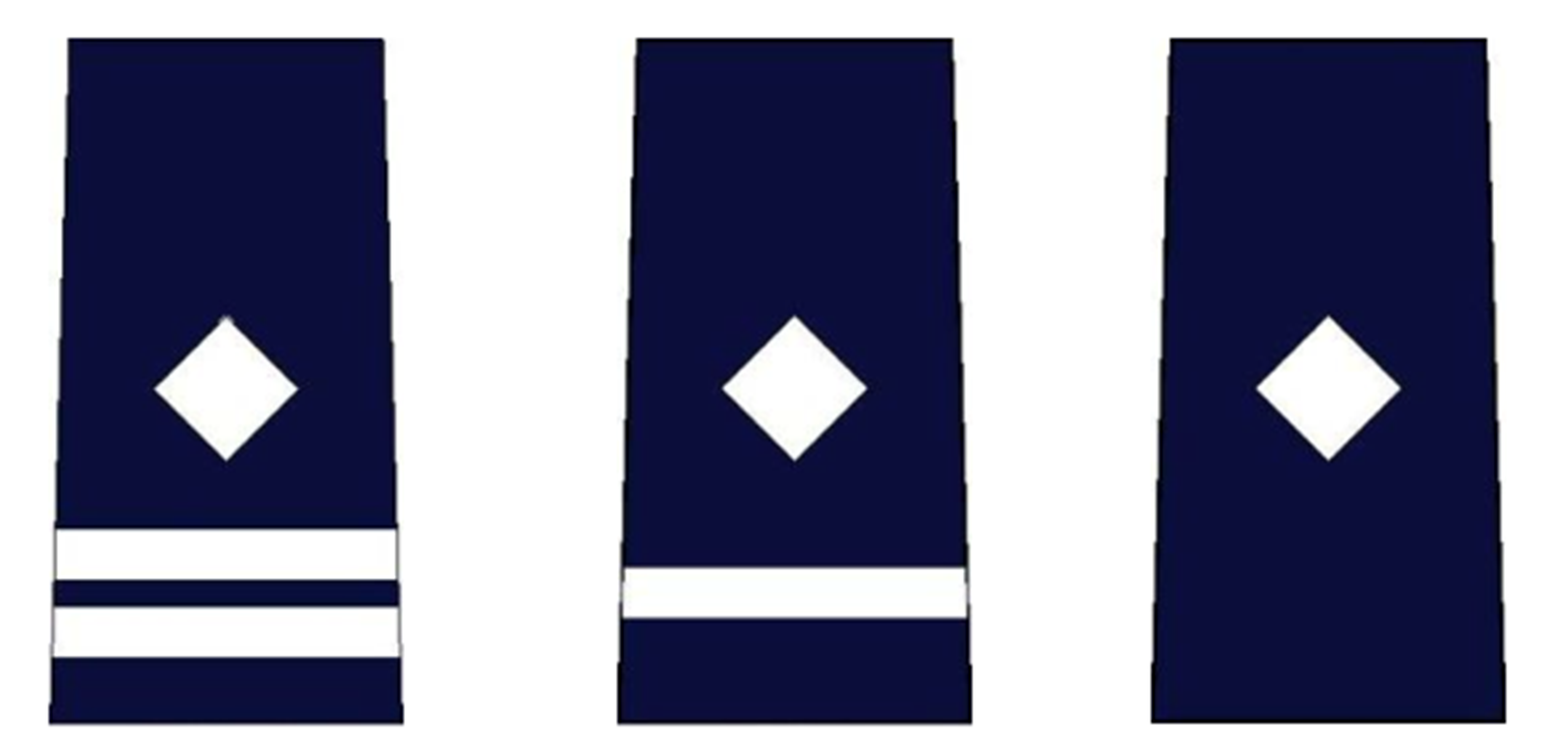 由左到右依次為青年團團長、助理團長及青年團訓練員的肩章。